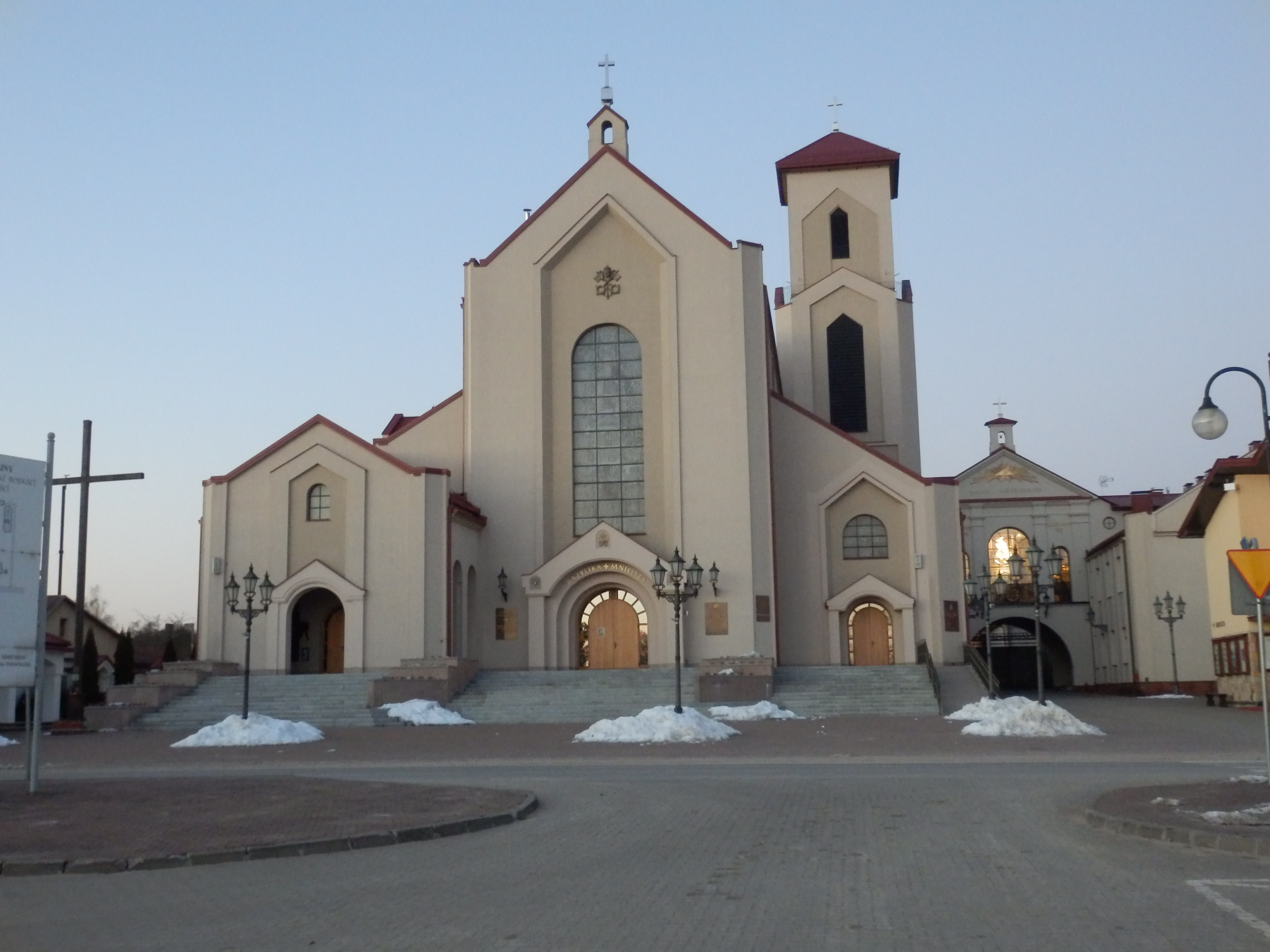 Widok na Bazylikę Matki Bożej Ostrobramskiej w Skarżysku-Kamiennej zza ulicy Wileńskiej (z Promenady Ostrobramskiej).